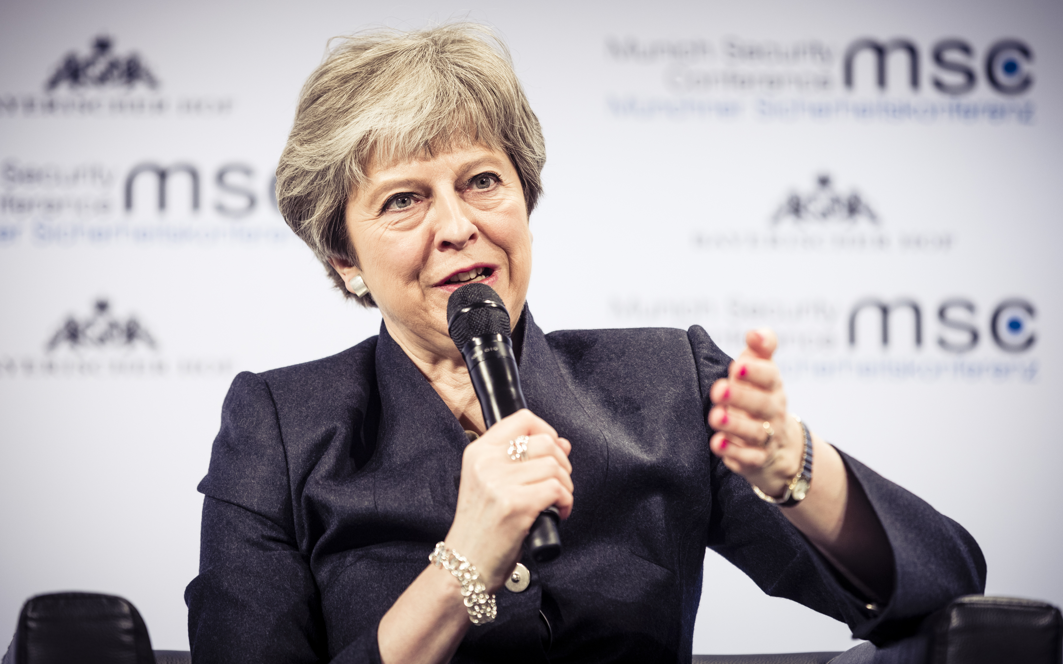 Theresa May während der Münchener Sicherheitskonferenz 2018